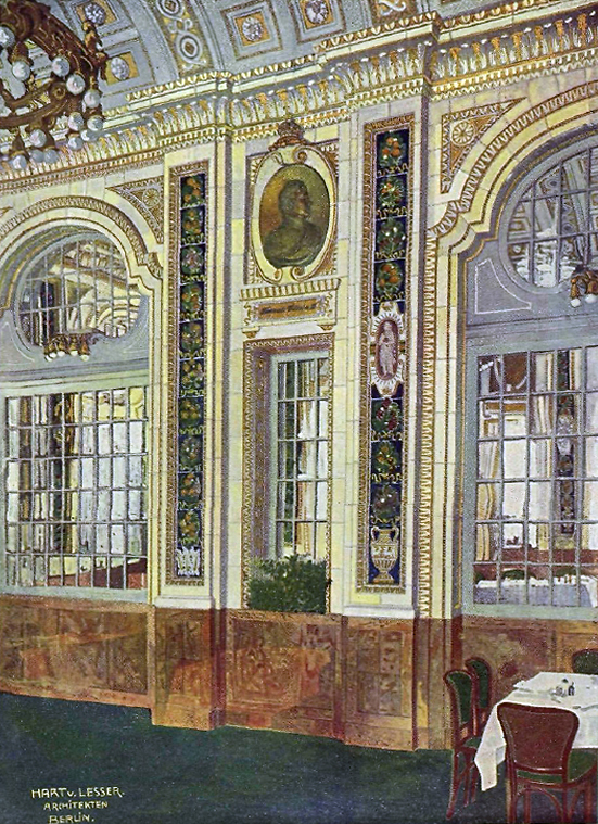 Weinhaus Kempinski, Leipziger Str. 25, Berlin